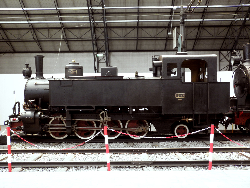 Locomotiva tipo P delle Ferrovie dello Stato, conservata nel padiglione ferroviario del Museo della Scienza e della Tecnologia di Milano.